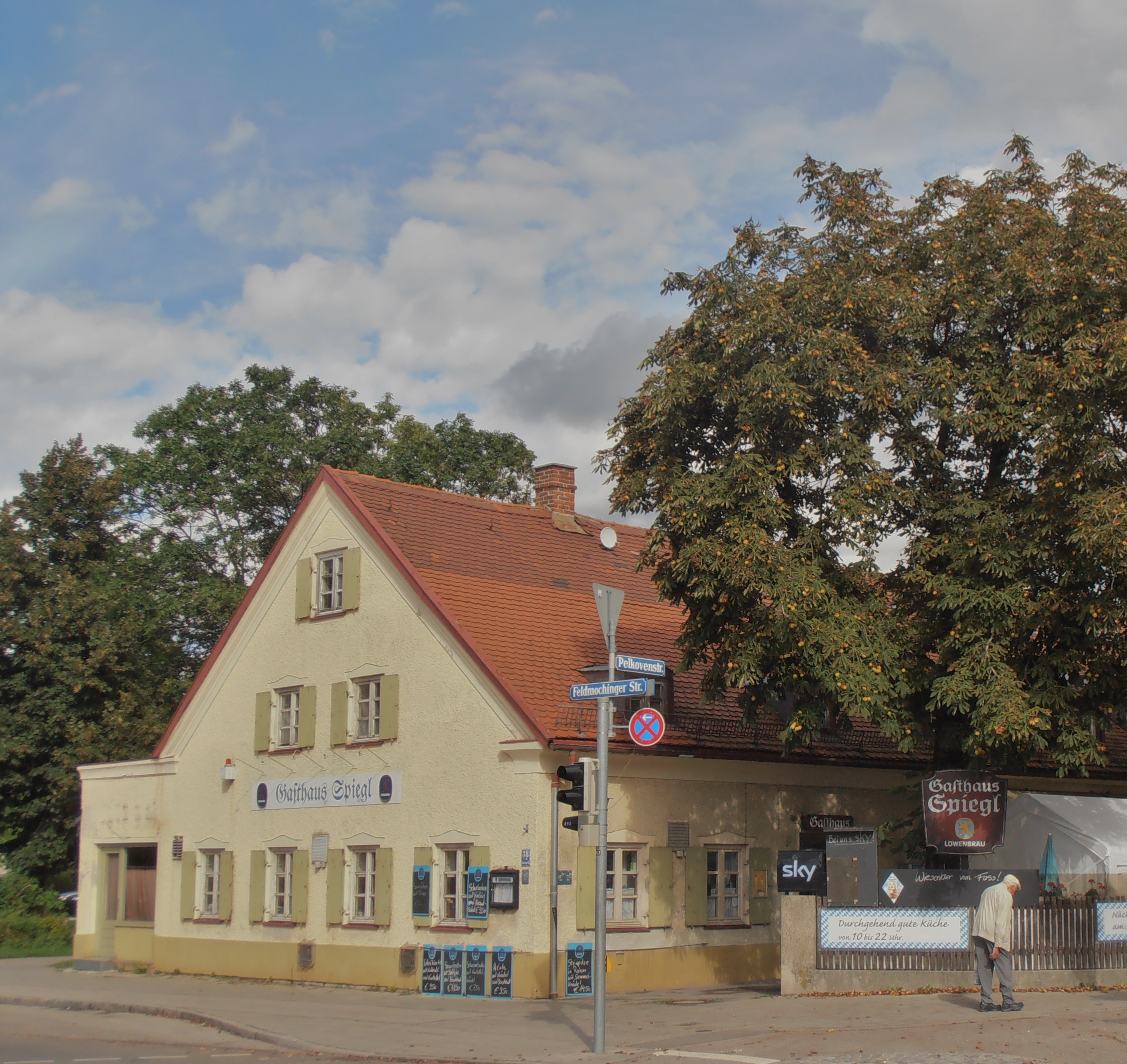 Gasthaus Spiegl in der Feldmochinger Str. 38 in München-Moosach (Ecke Pelkovenstr.)